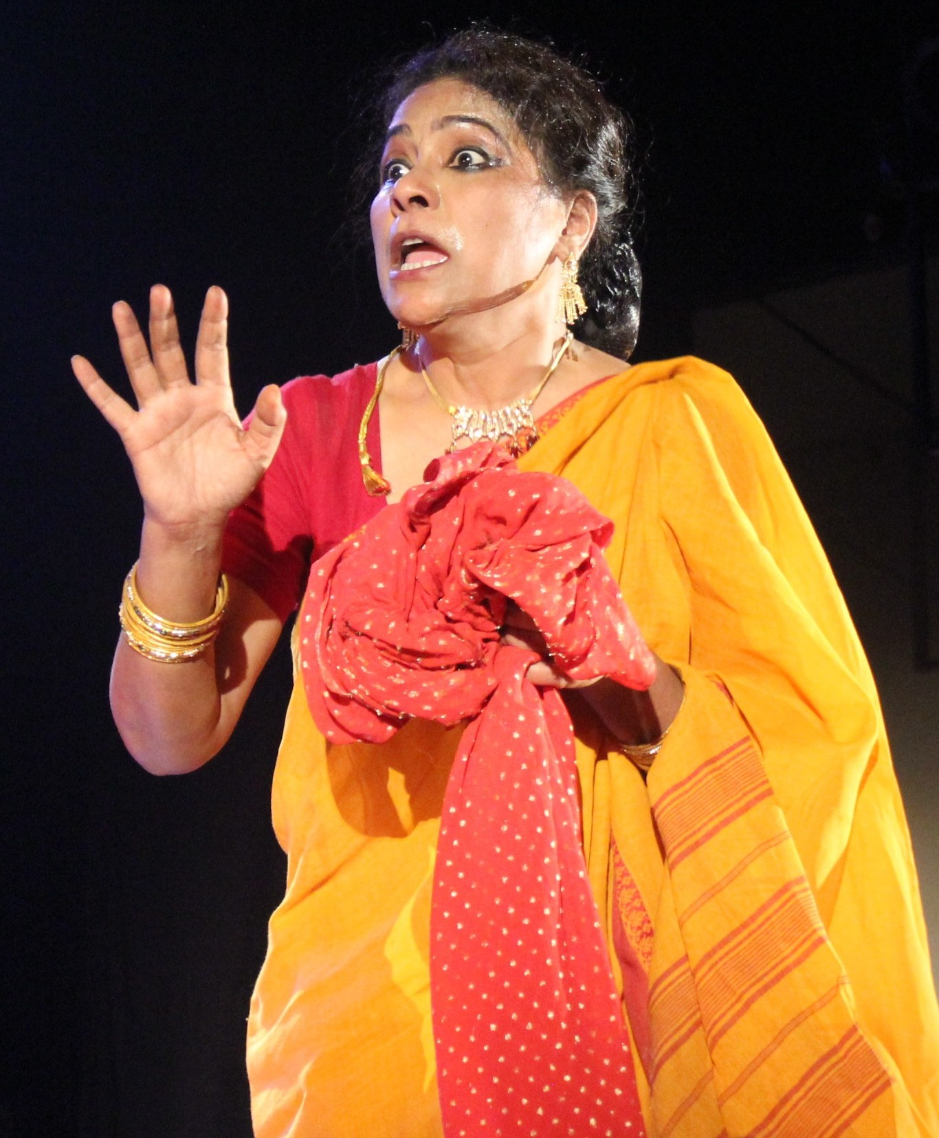 অসমীয়া: বিশ্বকবি ৰবীন্দ্রনাথ ঠাকুৰৰ ‘স্ত্রীৰ পত্র’ নাটকৰ এটি দৃশ্যত অভিনেত্রী সীমা বিশ্বাস।